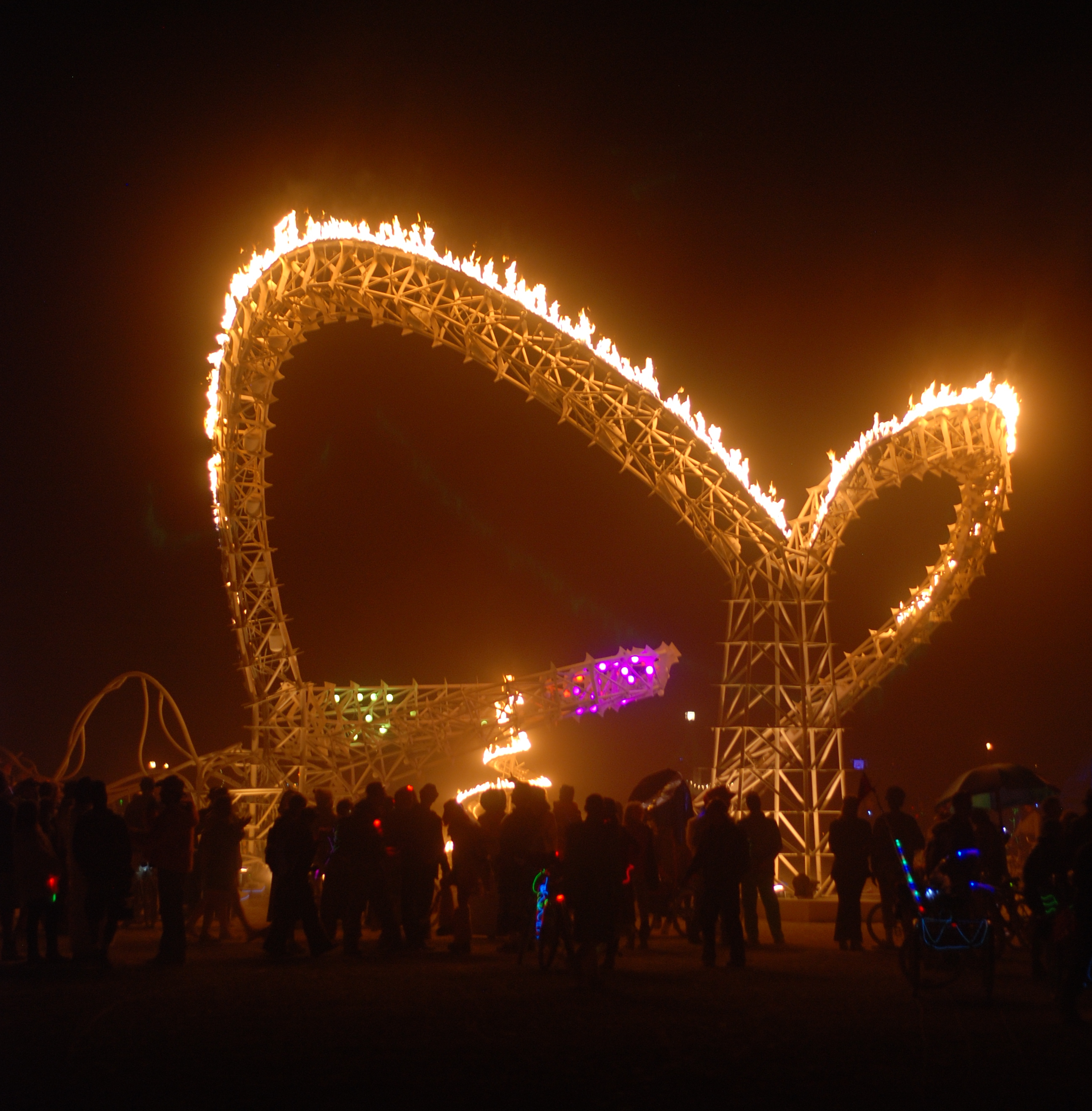 Tympani Lambada